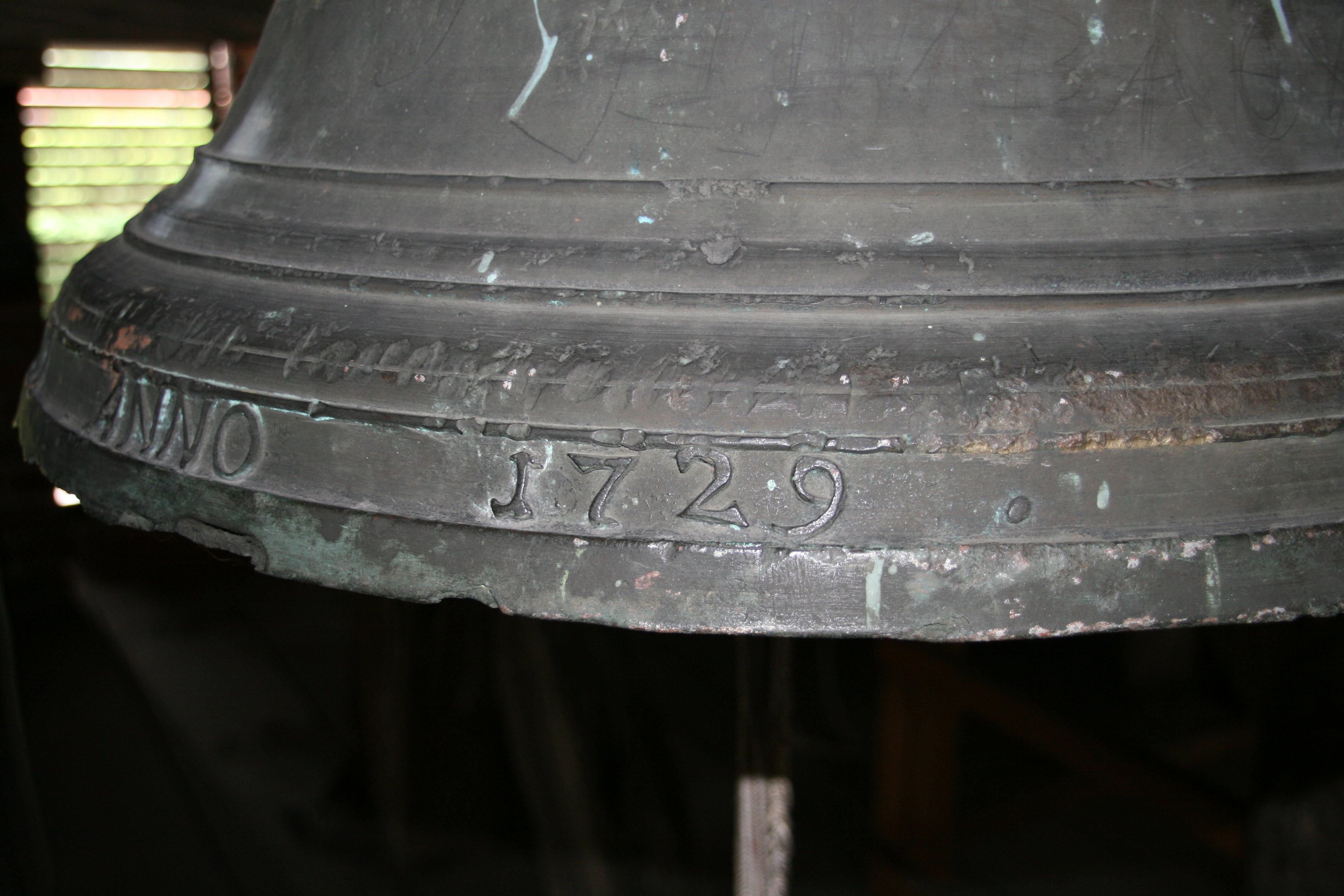 Detail der großen Kirchenglocke in Friedland/Prawdinsk